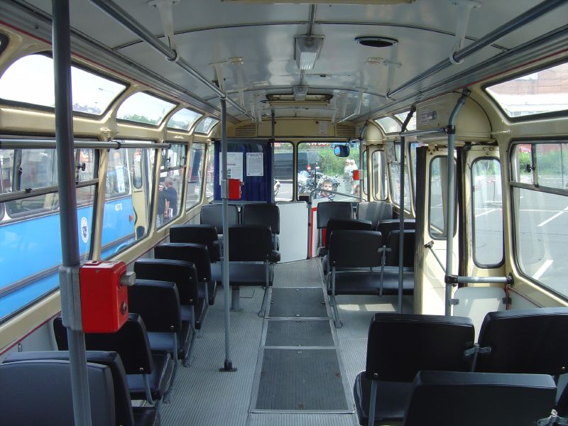 Interiér historického autobusu Karosa ŠM 11 v Ostravě